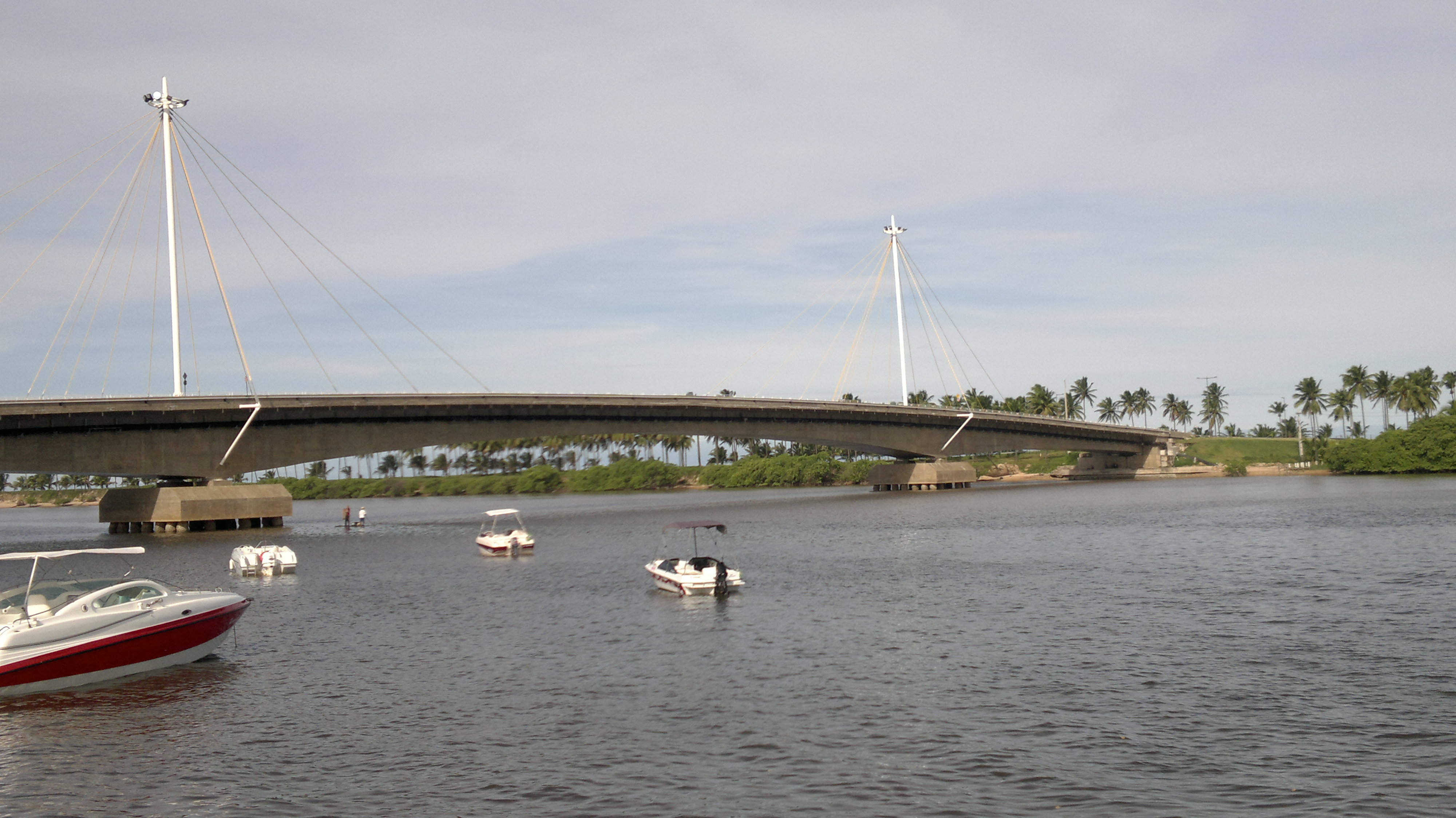 Ponte do Paiva vista da Marina do Por do Sol